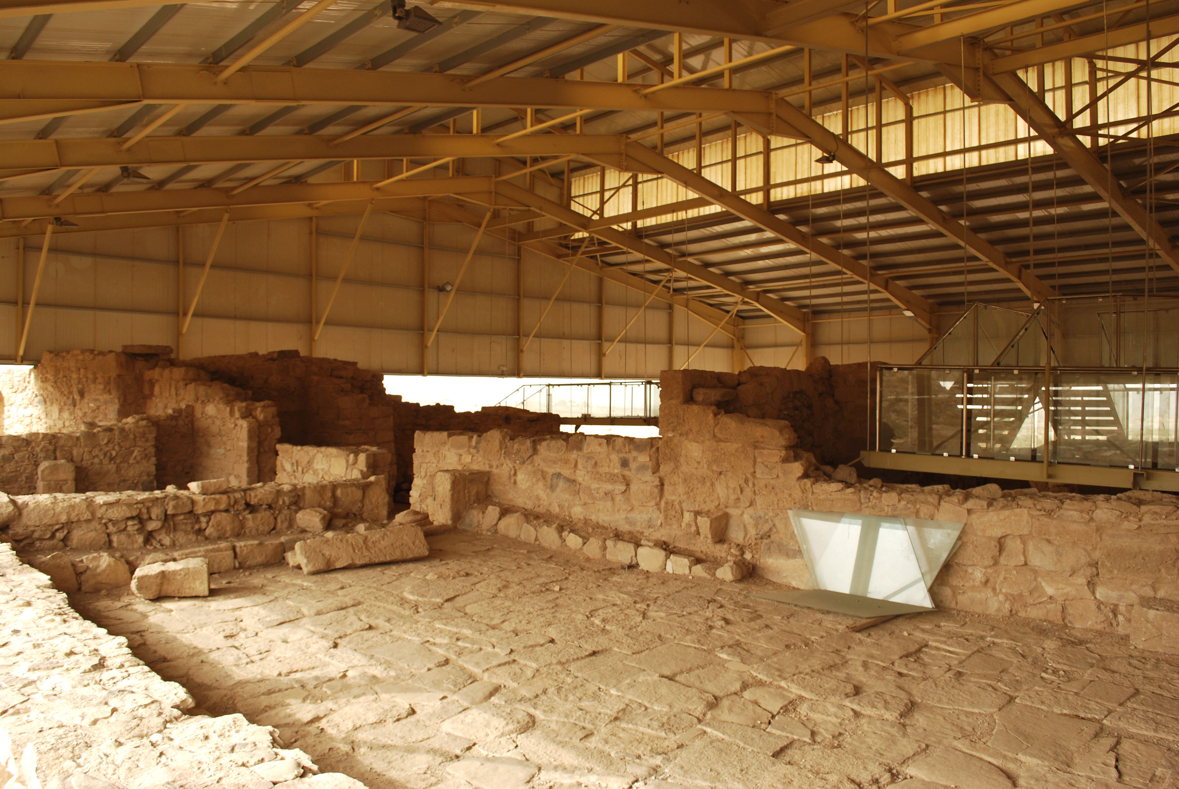 L'ancienne église Saint-Etienne à Umm ar-Rasas : vue d'ensemble de la structure de protection des mosaïques.